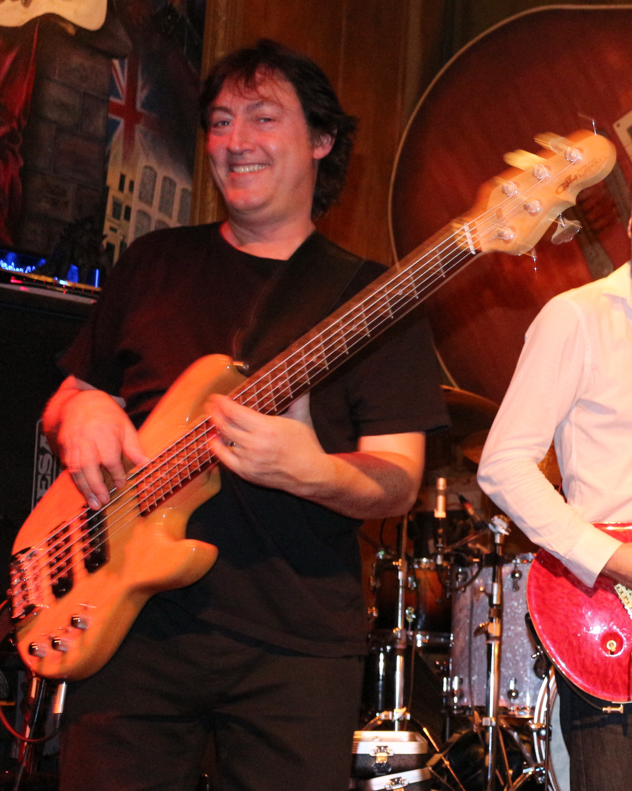 Alan Thomson am Bass in der Bluesgarage Isernhagen (mit der Martin Barre Band)